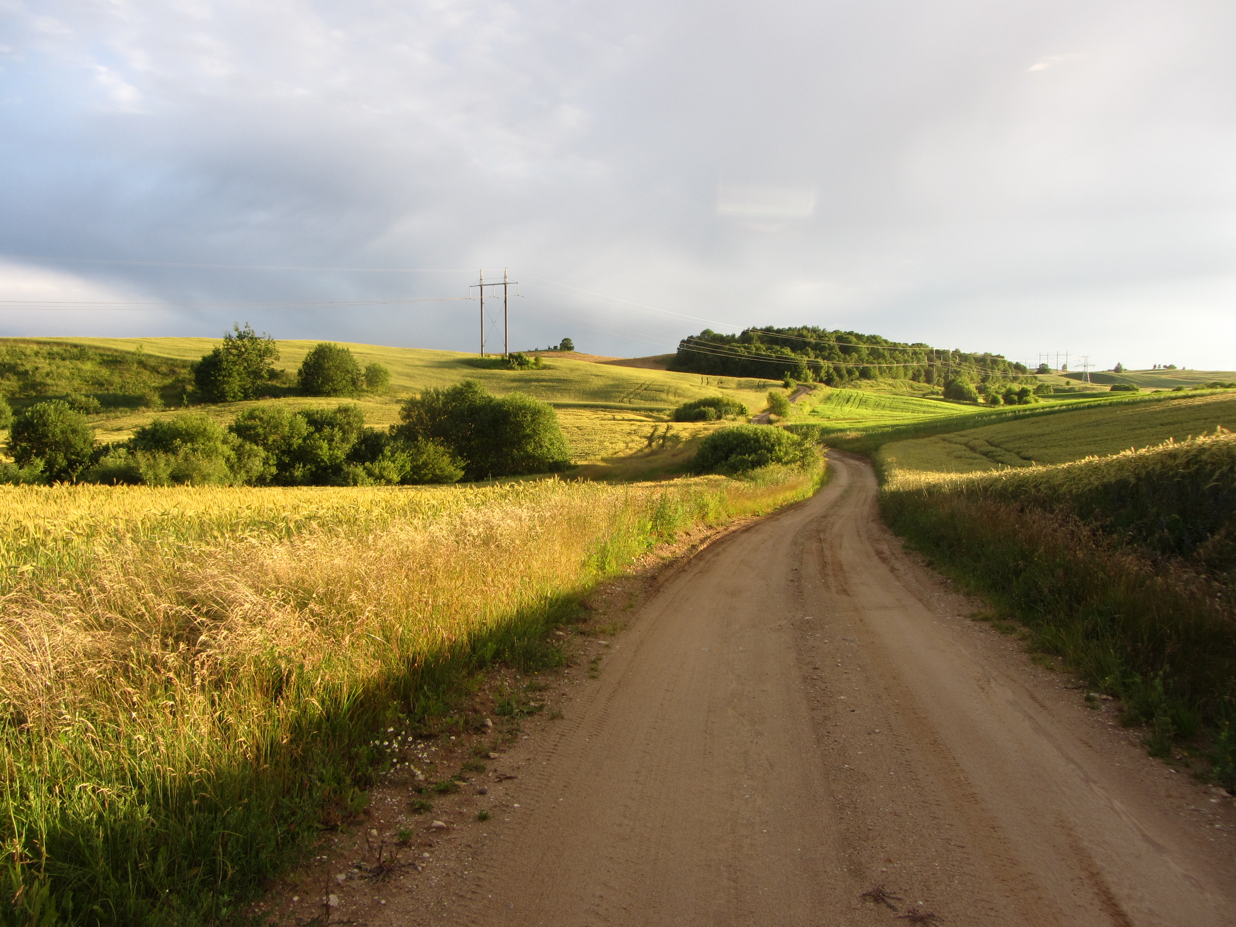 Vievio sen., Lithuania